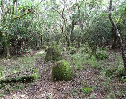 West Bonya Latte Site, Guam.